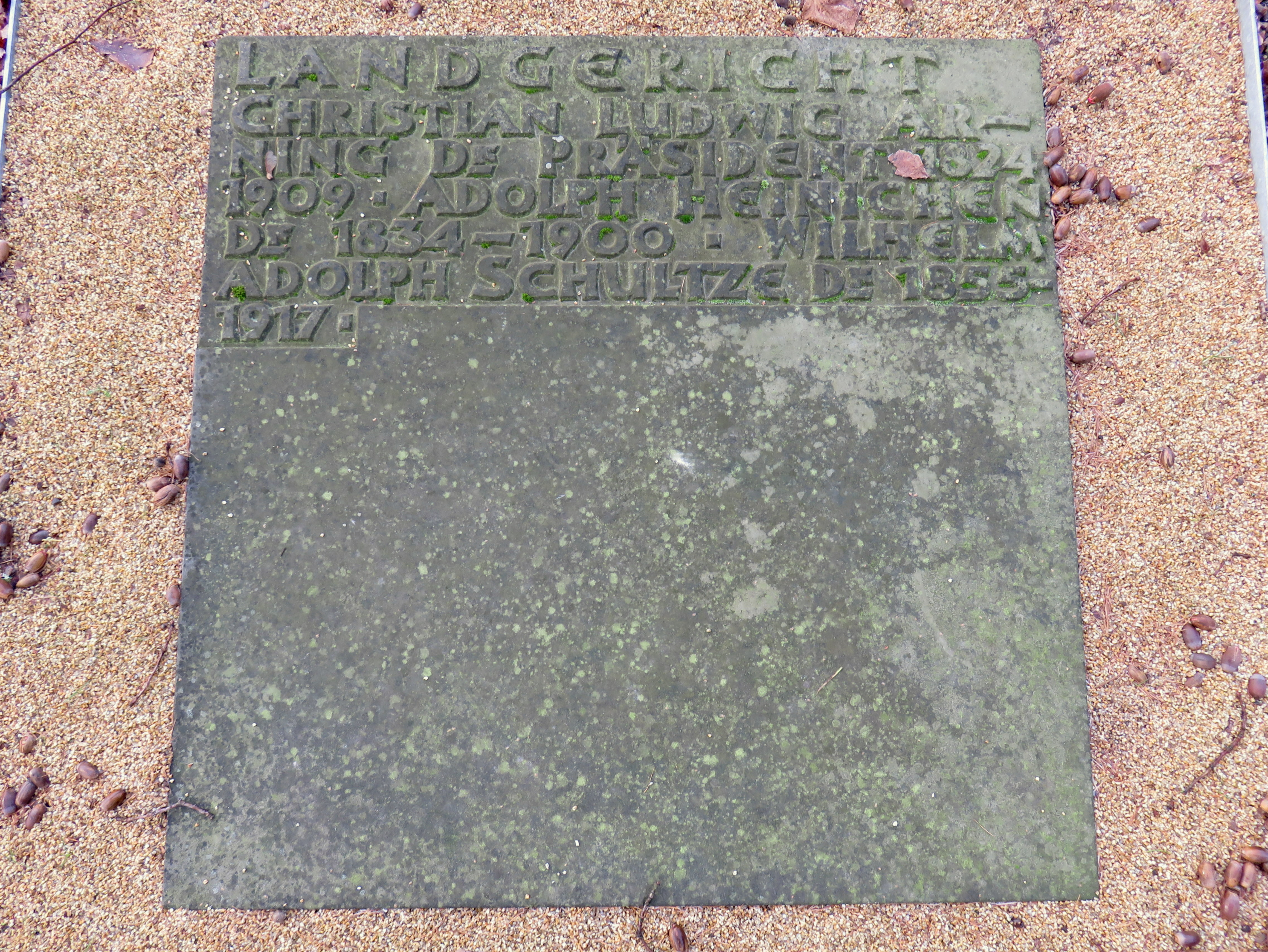 Sammelgrab Landgericht im Bereich des Althamburgischen Gedächtnisfriedhofs auf dem Hamburger Friedhof Ohlsdorf zu Ehren von unter anderen Christian Ludwig Arning.